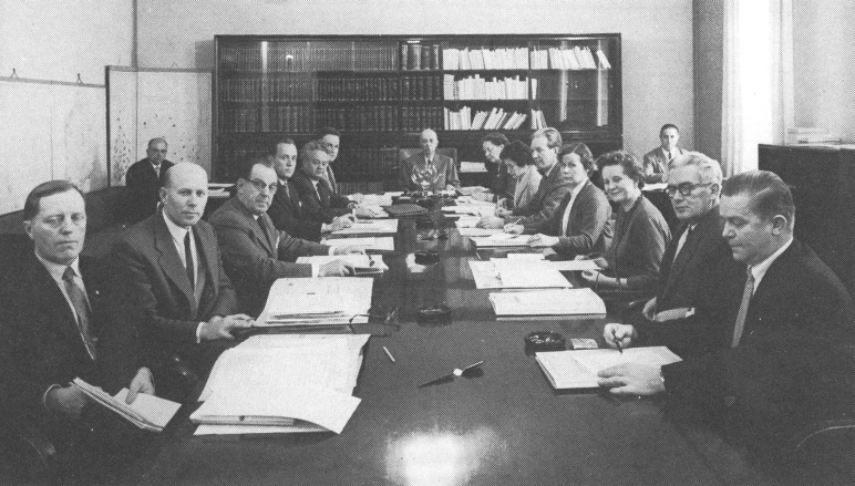 Eduskunnan sivistysvaliokunta 21. lokakuuta 1959. Kuvassa vasemmalta Antti J. Rantamaa, Eino Uusitalo, Armas Leinonen, Olavi Lähteenmäki, Samuel Sundel, Sundelin tulkki, Eino Kilpi, Judit Nederström-Lunden, Anna-Liisa Tiekso, Kuuno Honkonen, Impi Lukkarinen, Meeri Kalavainen, Pentti Niemi ja Ensio Partanen. Taustalla vasemmalla Reino Oittinen ja oikealla Esko Kauppila.